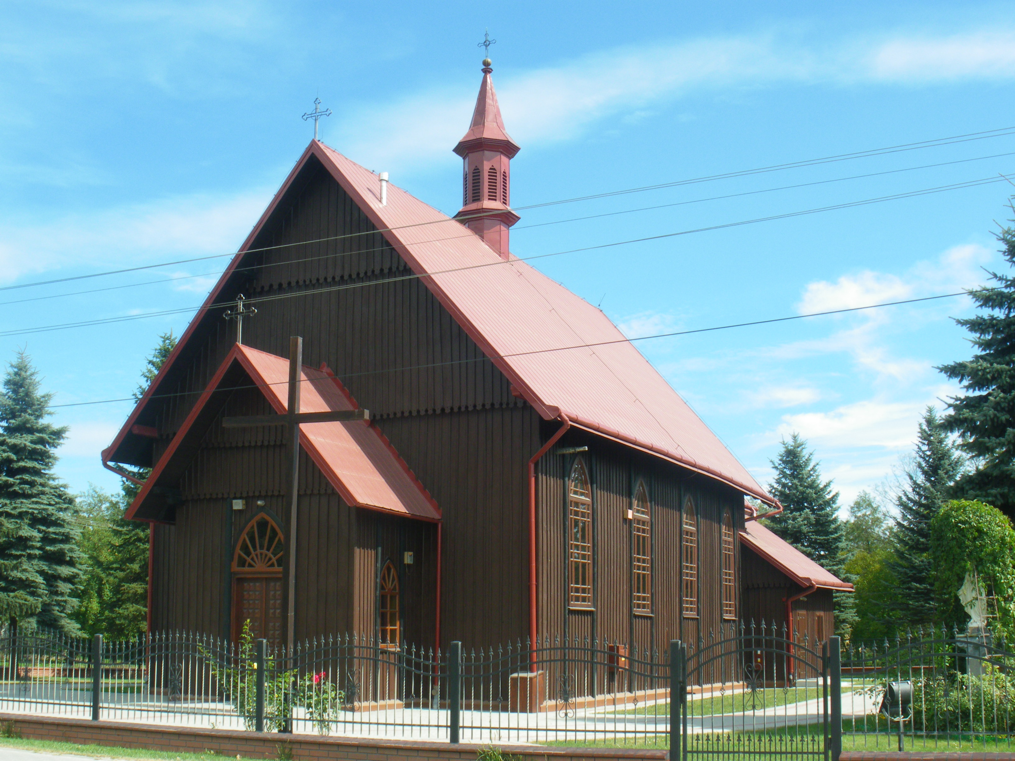 Kościół parafialny p.w. NMP Królowej Polski w Ostrowie, gmina Ostrów, powiat ropczycko-sędziszowski, województwo podkarpackie